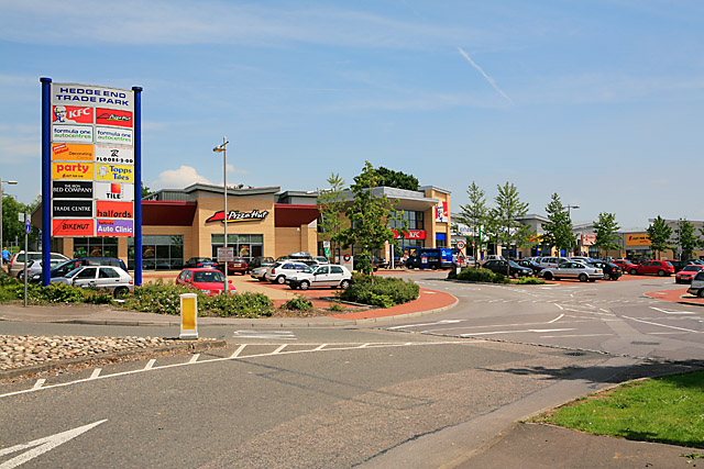 Hedge End Trade Park